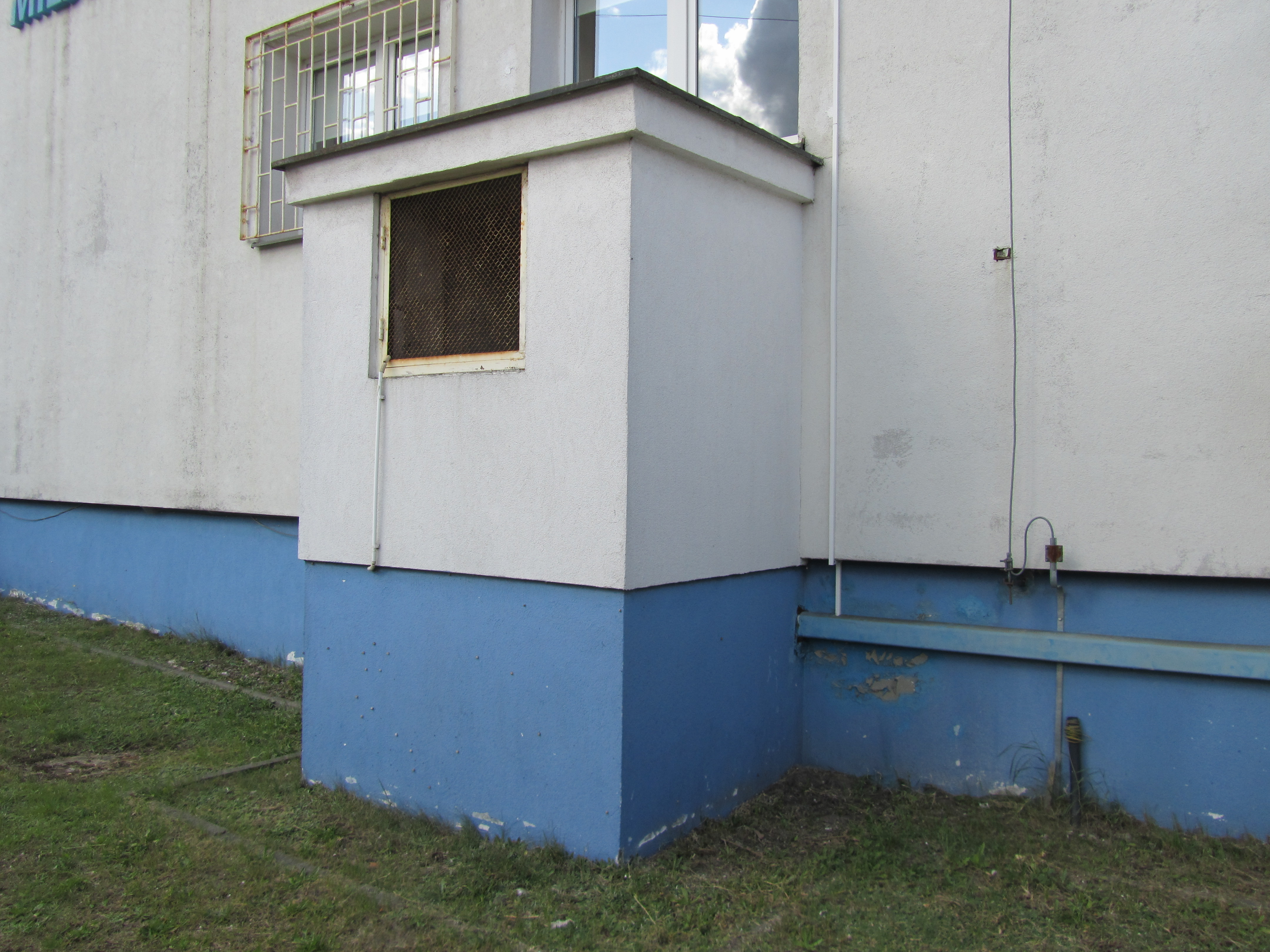 Wyjście zapasowe ze schronu usytuowane bezpośrednio przy ścianie budynku jest dopuszczalne w przypadku niskich budynków o wysokości górnej elewacji nieprzekraczającej 16 m.